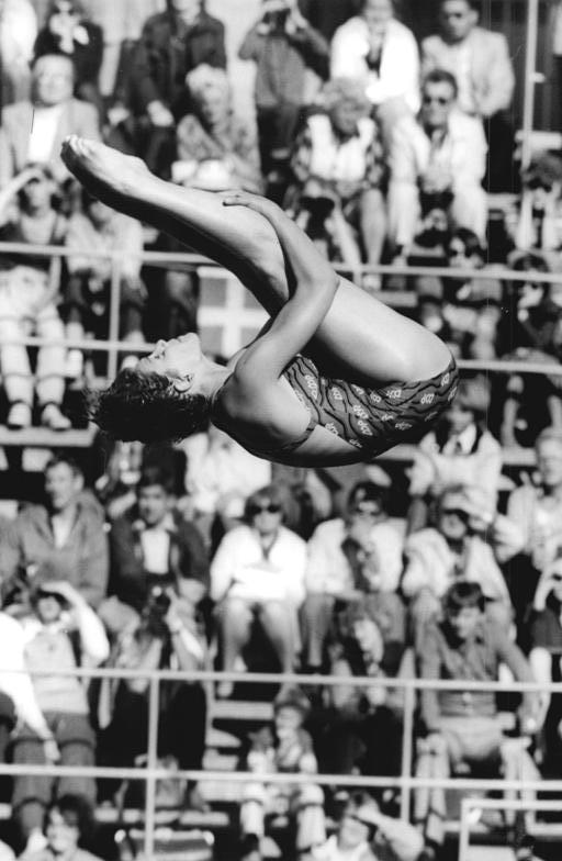 Martina Jäschke ADN-ZB Mittelstädt 11.8.79 Sibiu: Am zweiten Tag des Europacup-Wettbewerbs im Wasserspringen gab es am 11.8. durch Martina Jaeschke einen DDR-Erfolg. Mit 407,23 Punkten gewann die Springerin die Konkurrenz vom Turm. Unser Foto zeigt sie bei einem früheren Wettkampf. Abgebildete Personen: Jäschke, Martina: Turmspringerin, DDR